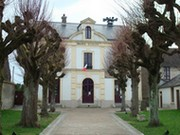 Mairie de Mondeville ( Essonne )